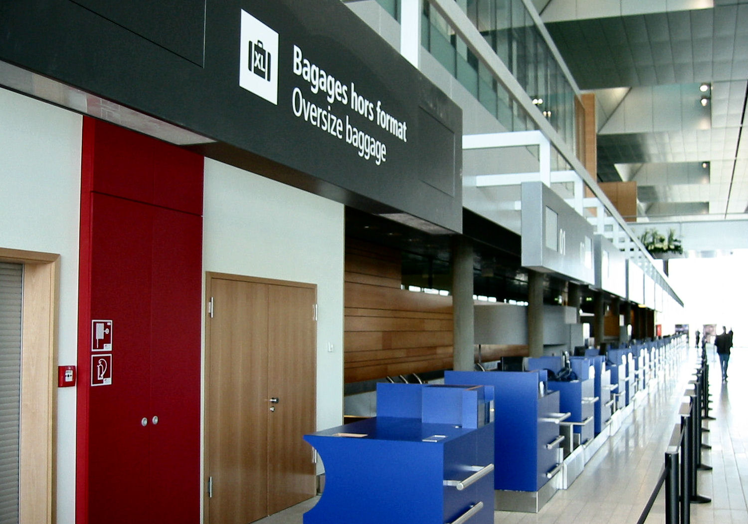 Checkin XL an der neier Aerogare um Findel.